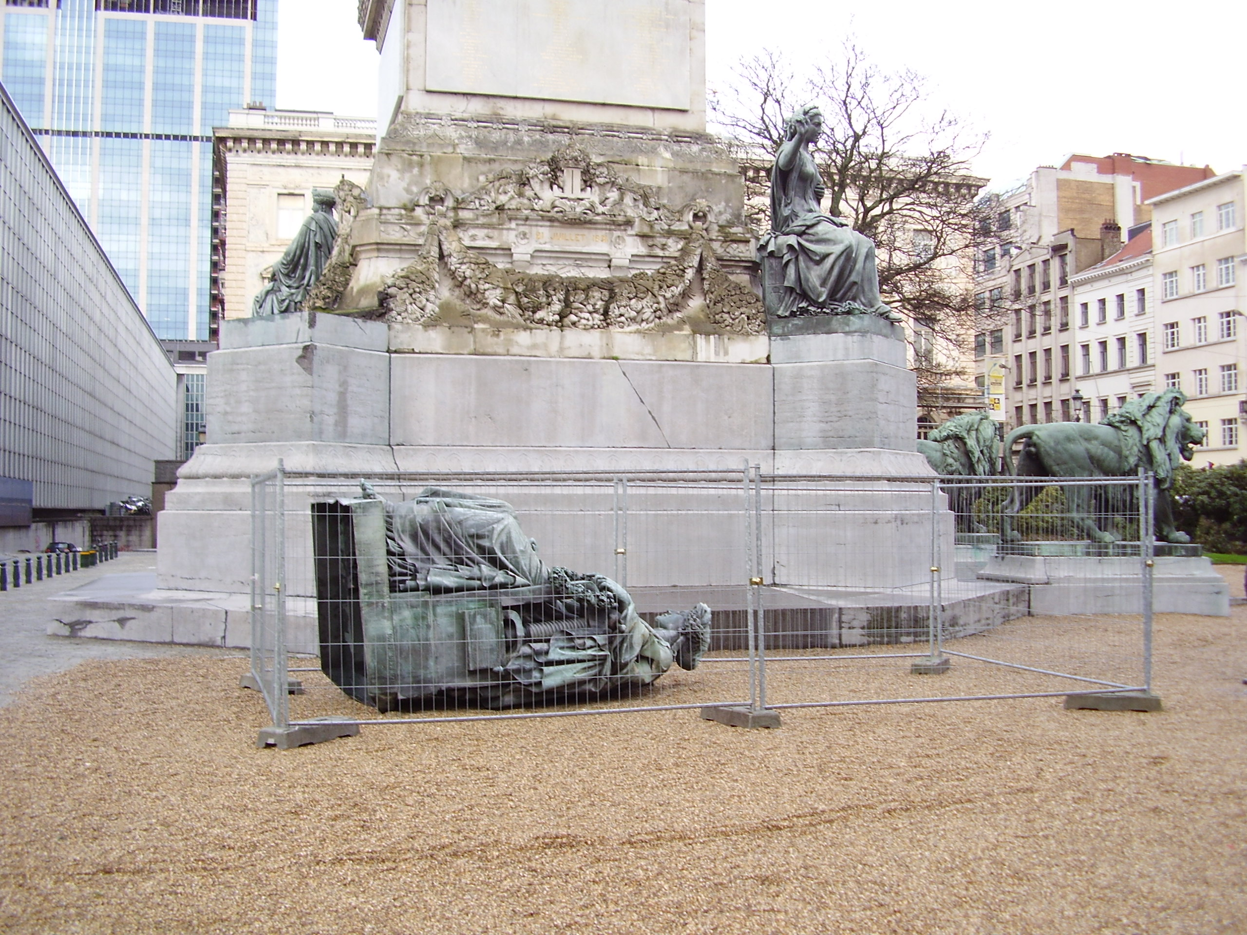 Colonne du Congrès, Bruxelles, représentation de la Liberté de la presse renversée lors de la tempête Kyrill du 18 janvier 2007